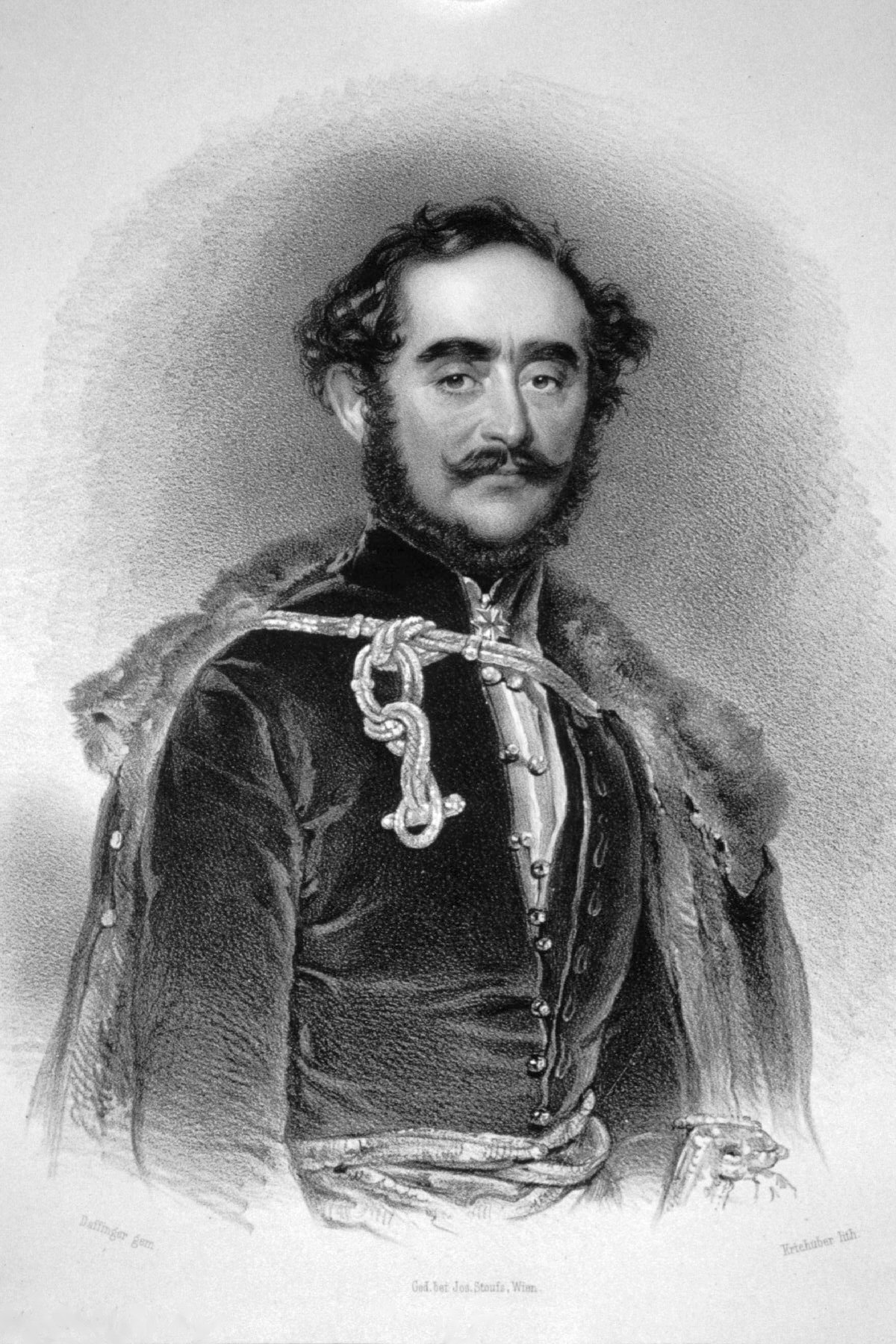 István Széchenyi (1791-1860), ungarischer Staatsmann. Lithographie von Josef Kriehuber, nach einem GEmälde von Daffinger